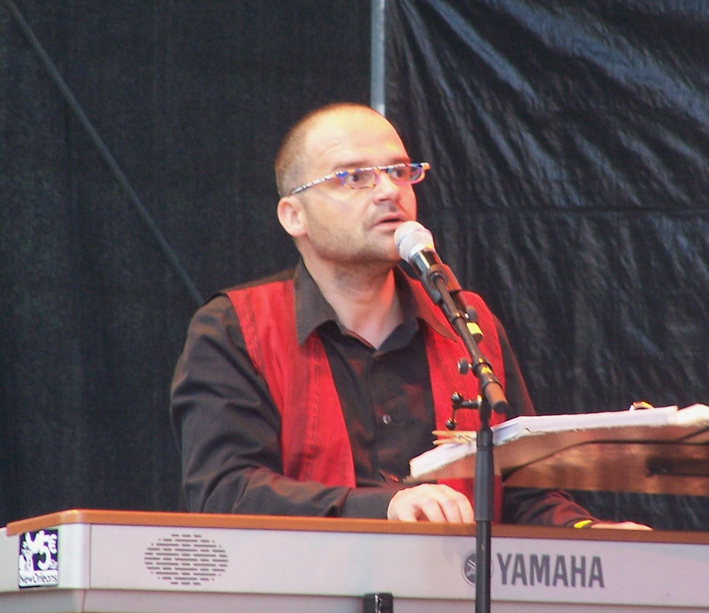 Thomas Stelzer beim Auftritt mit den Gospel Passengers auf dem Dresdner Stadtfest, 2009